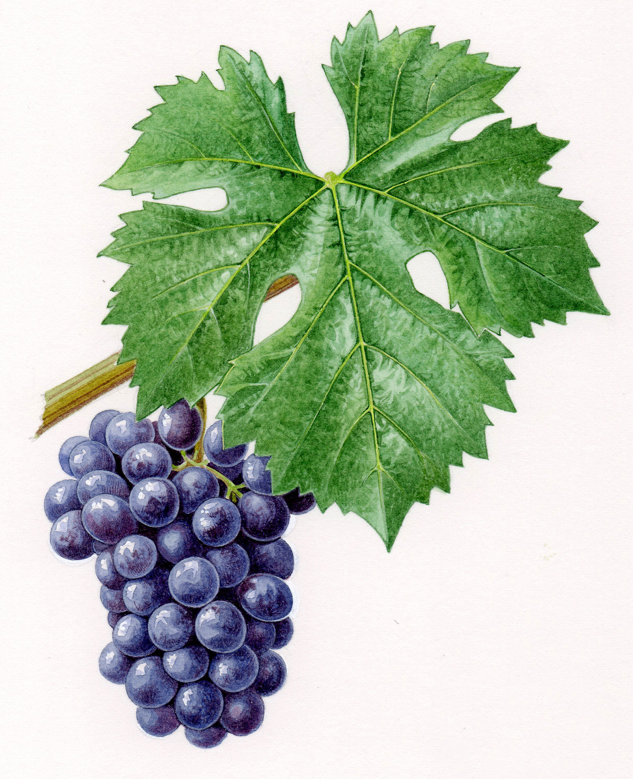 Aquarelle originale pour les Cépages de France (2001)